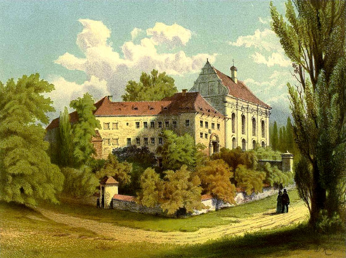 Schloss Deutsch-Wartenberg, Kreis Grünberg, Lithografie aus dem 19. Jahrhundert